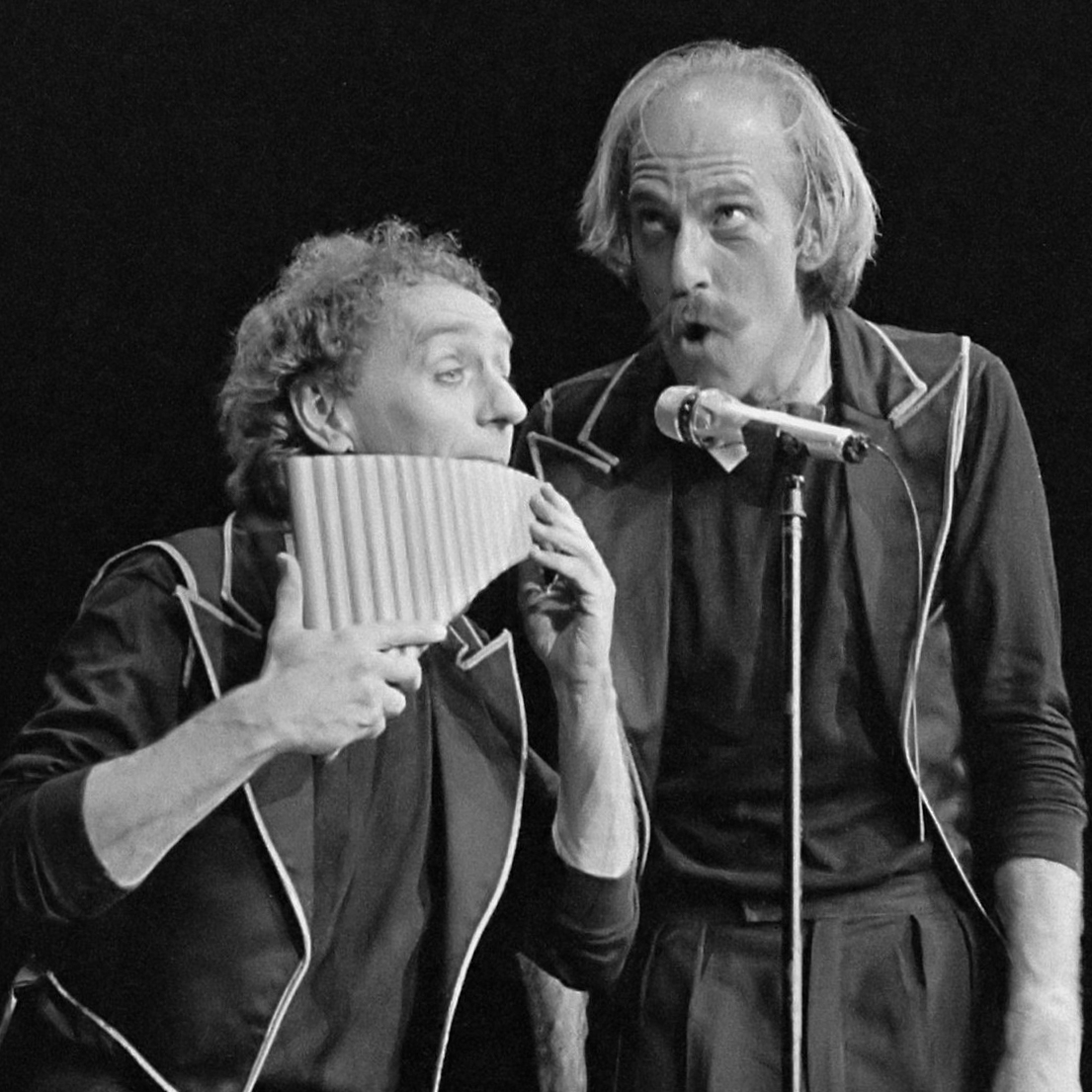 Mini en Maxi op Cabaretmarathon in Rotterdam 1 juni 1987